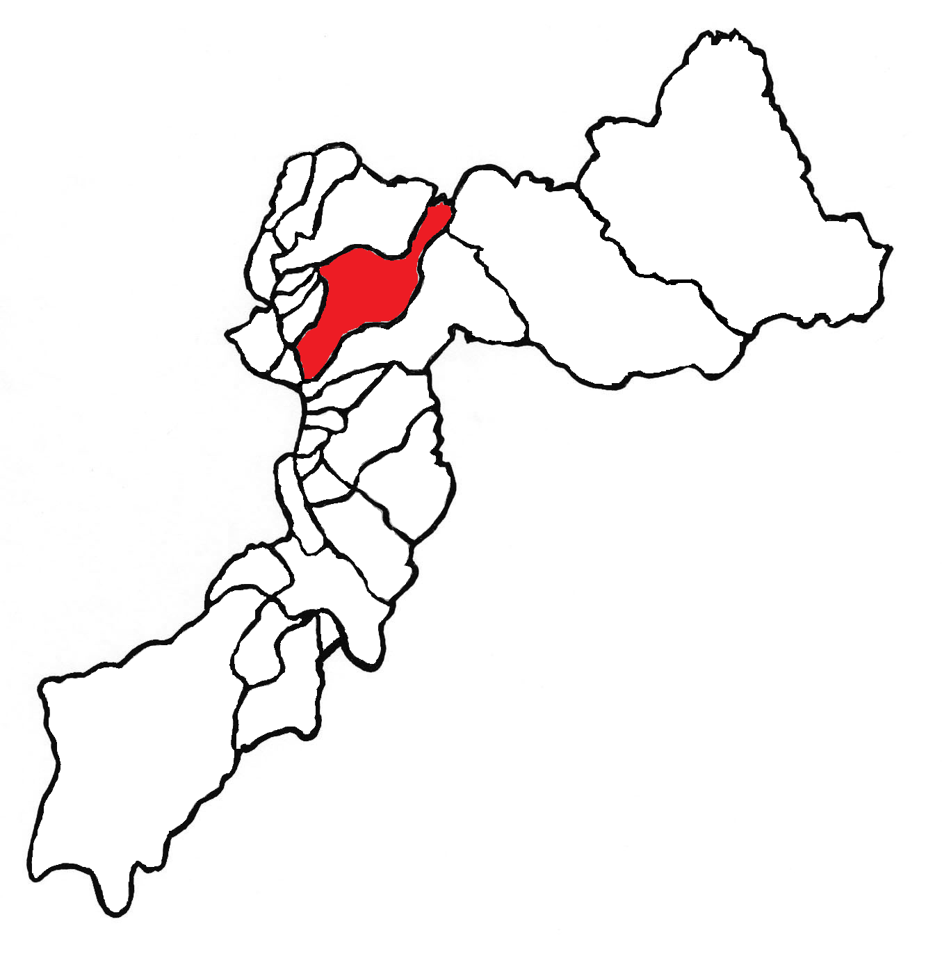 Ubicación del distrito en la provincia de Huancayo, departamento de Junín, Perú